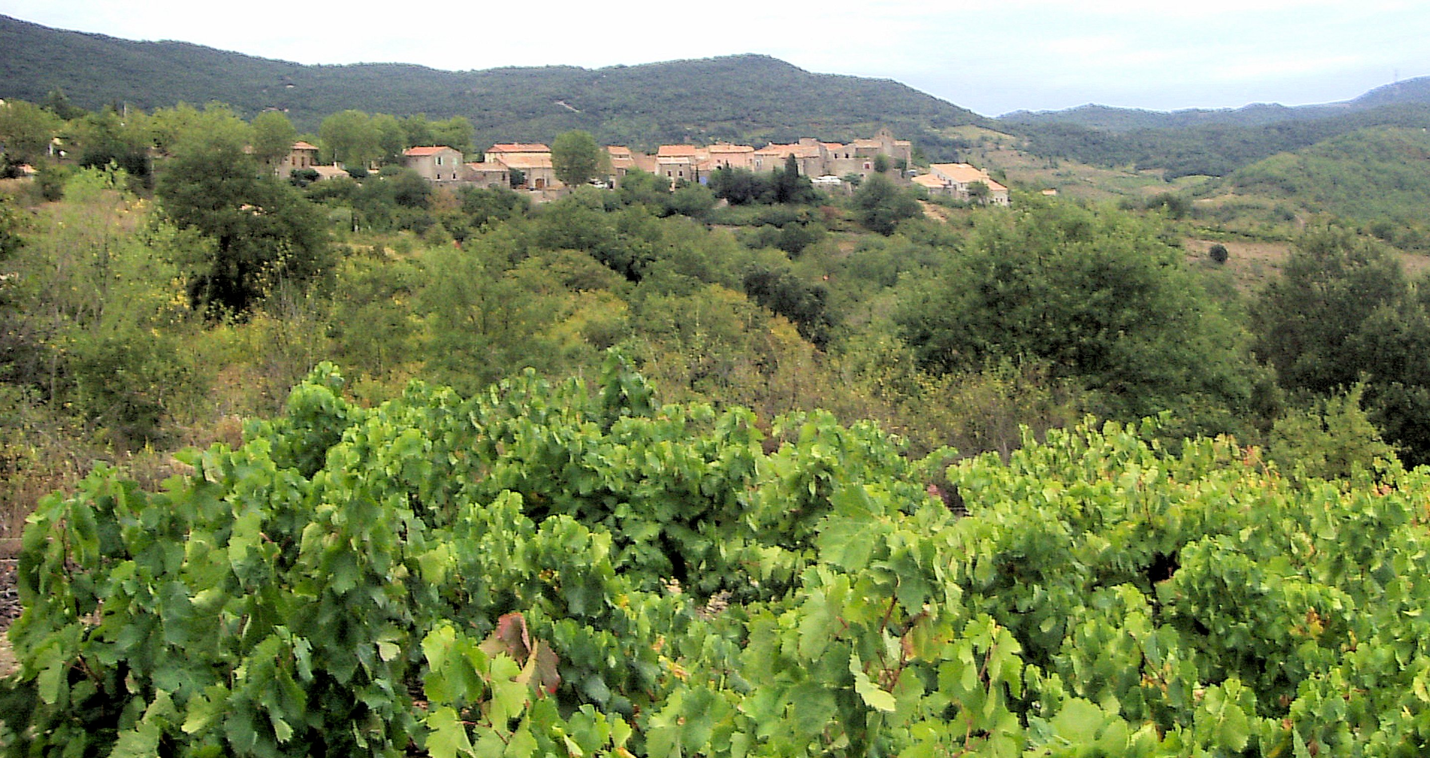 Quintillan, Vue depuis le nord-est